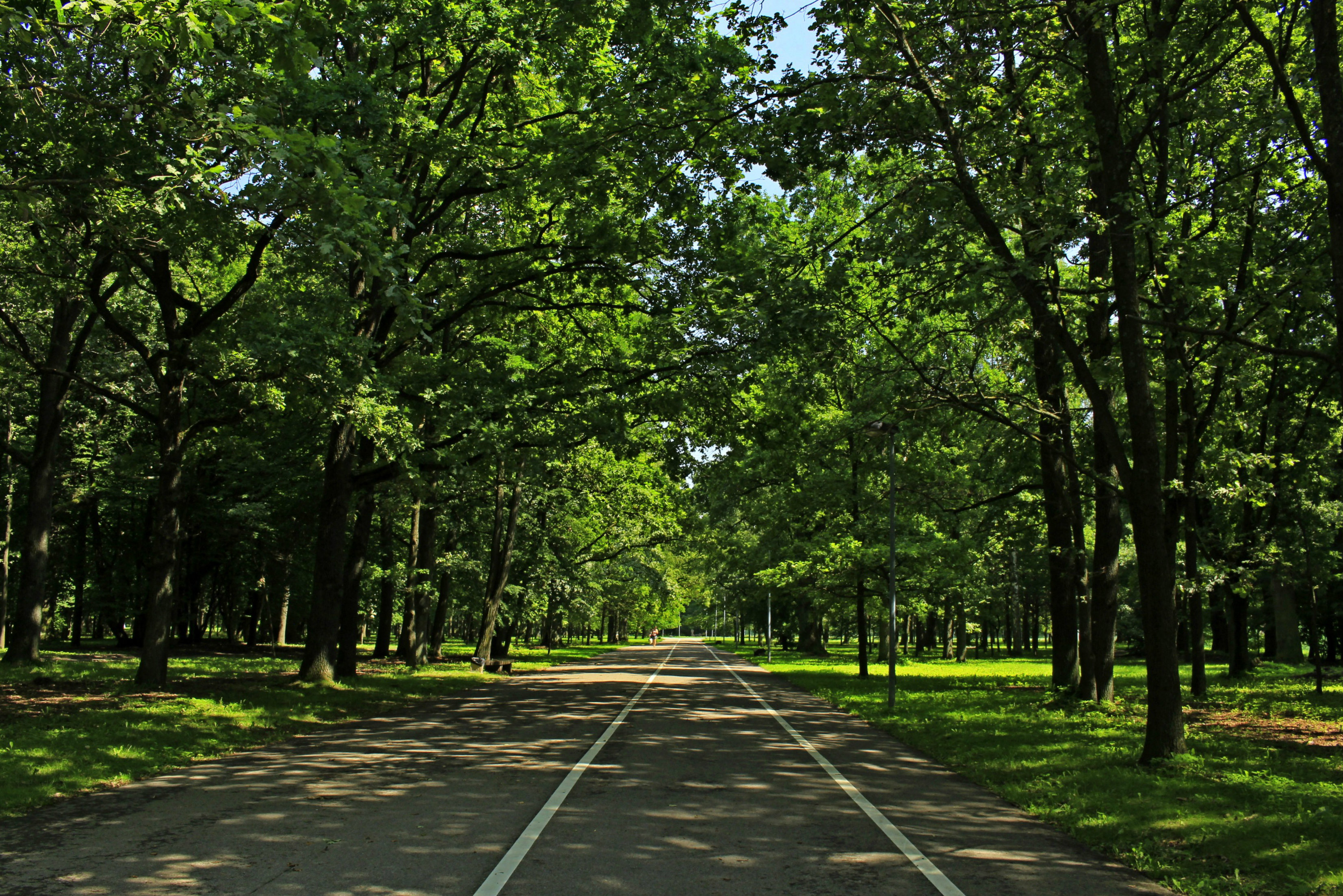 Kauno ąžuolynas